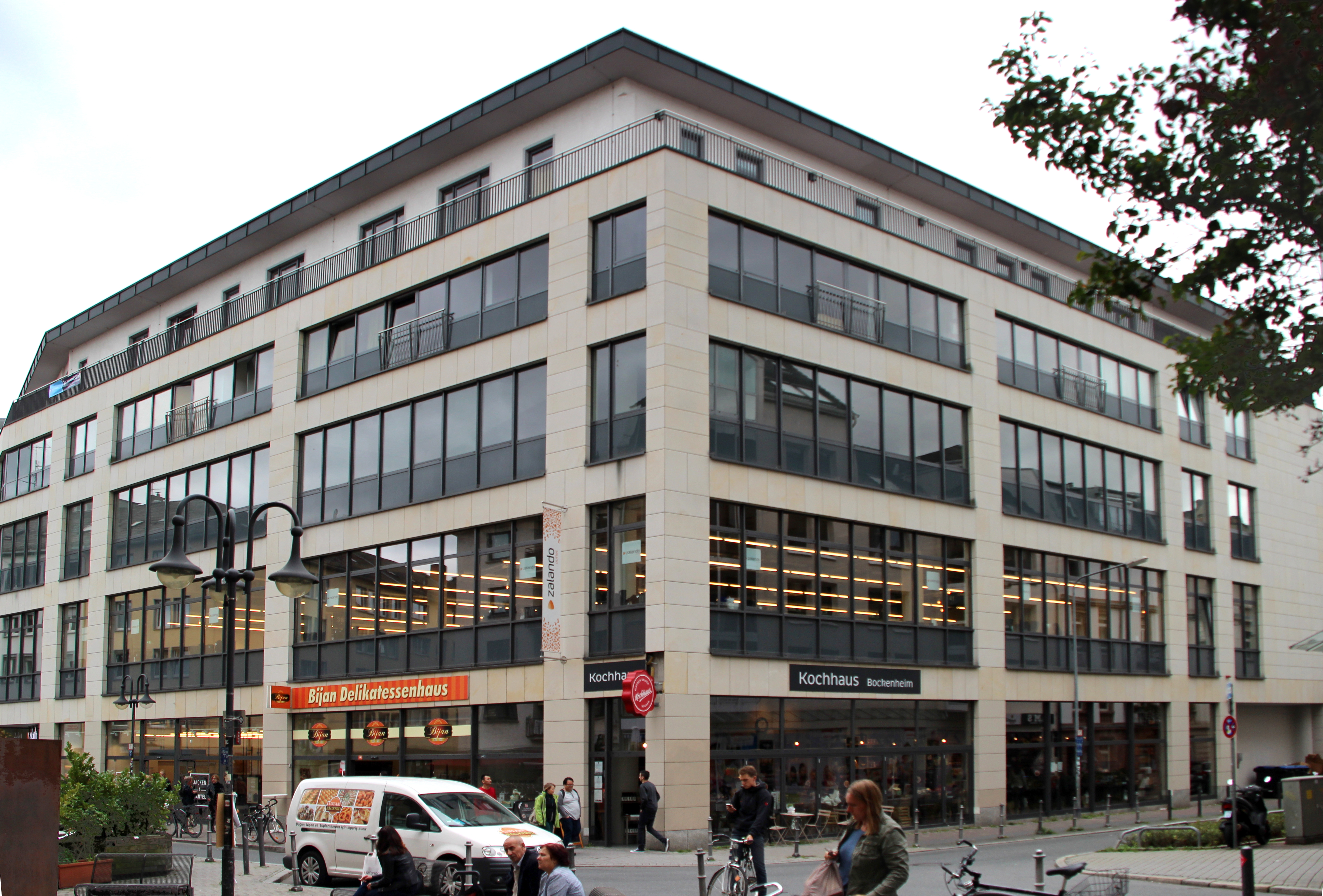 Bildinhalt: Leipziger Straße, ehemaliger Kaufhof Aufnahmeort: Frankfurt am Main, Deutschland